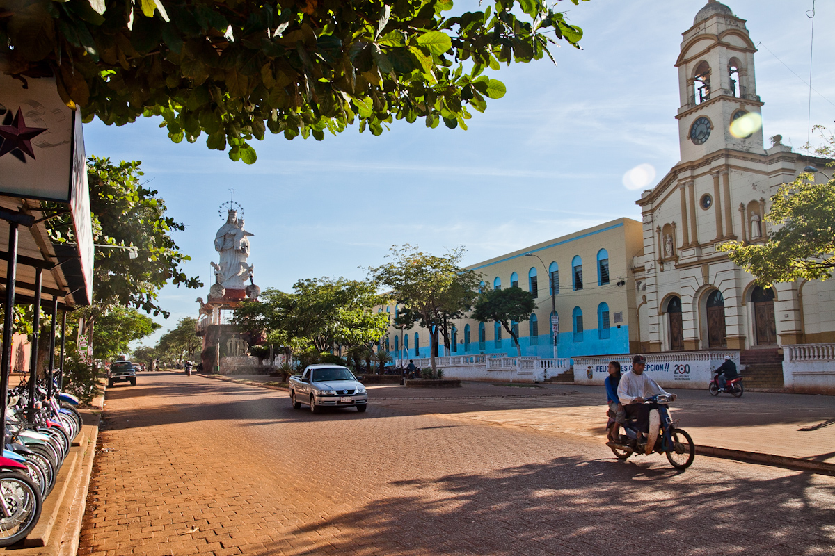 Nuestra Señora de la Concepción